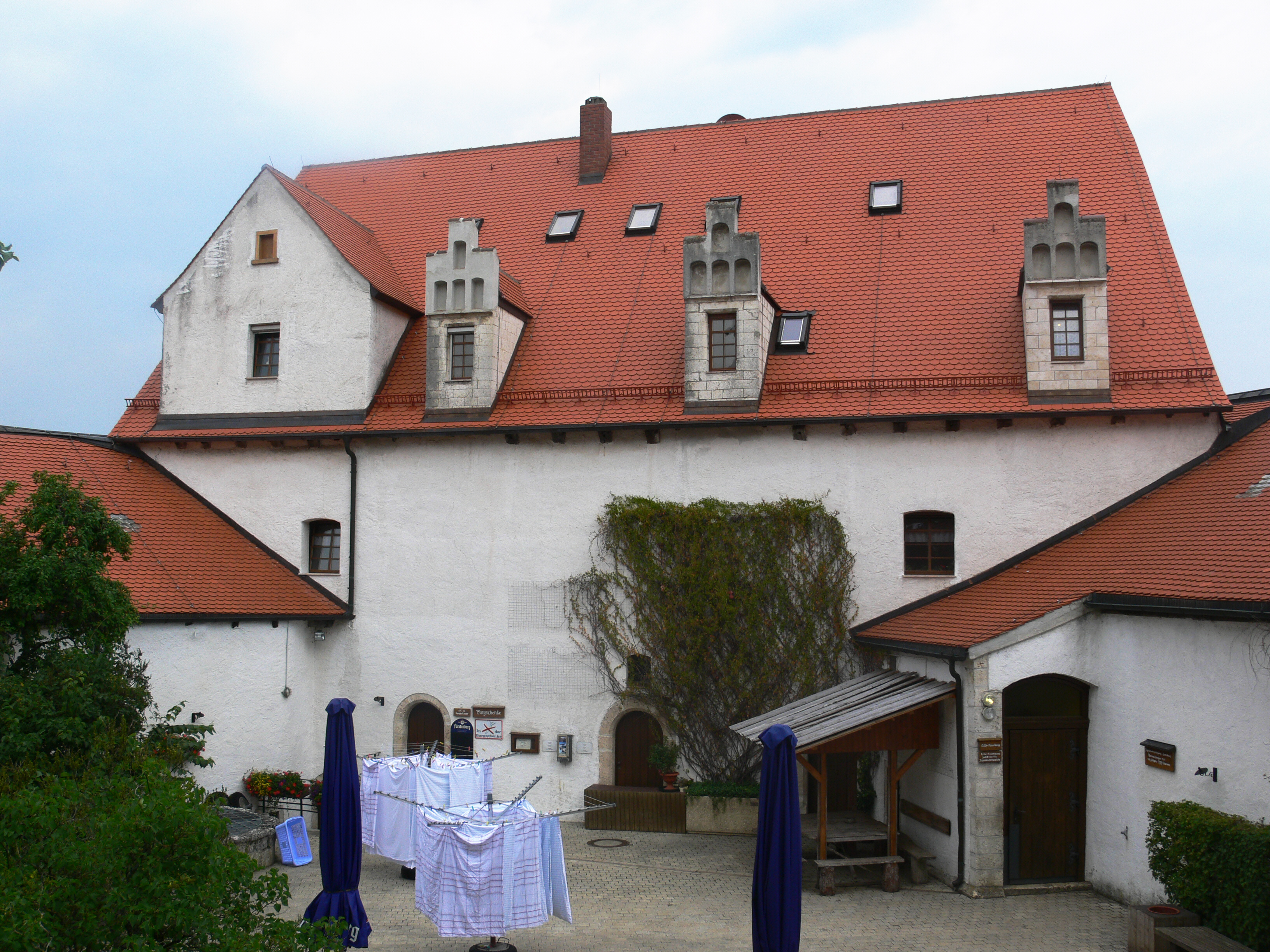 Burg Wildenstein bei Leibertingen Burghof mit Hauptgebäude